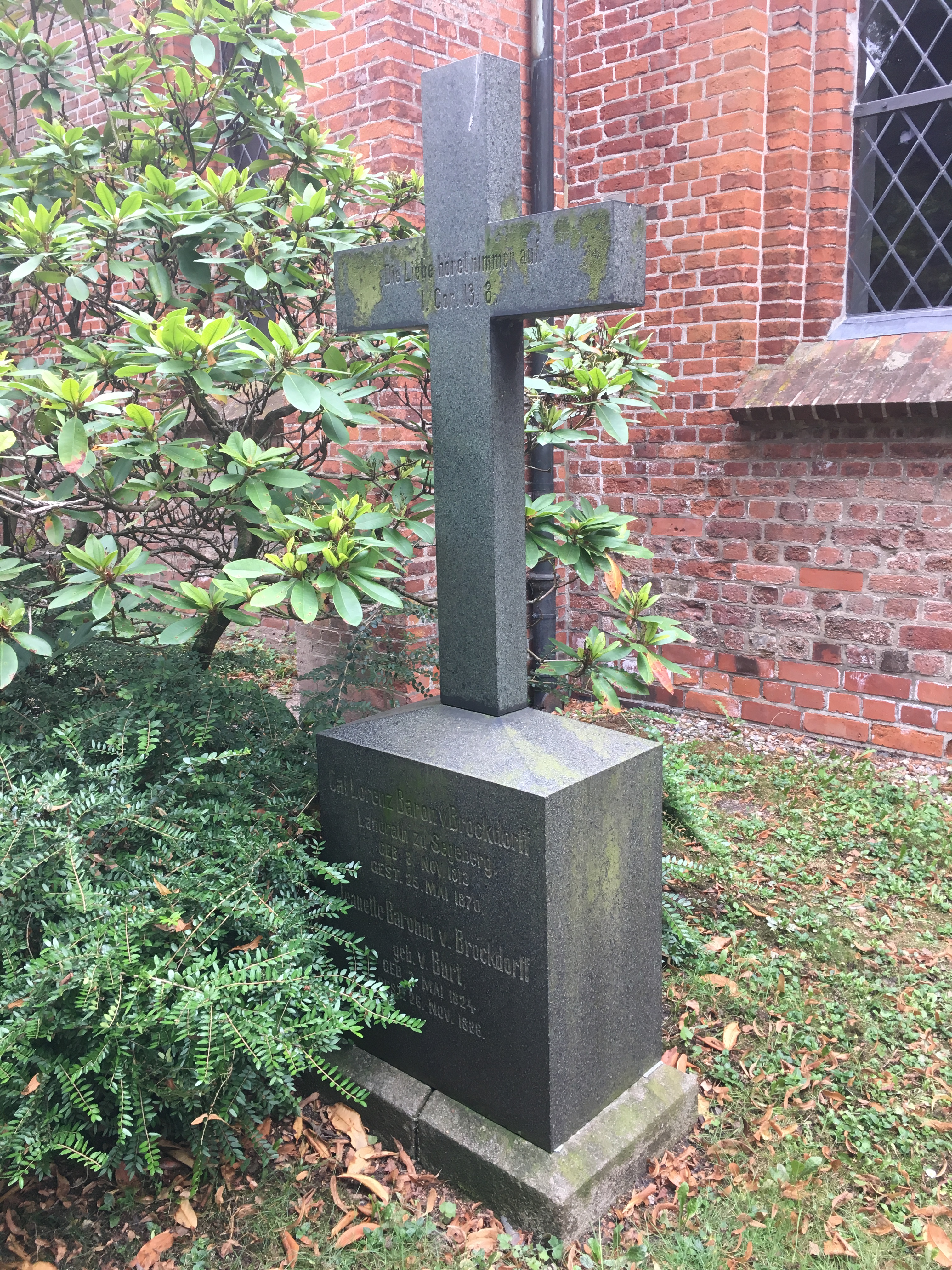 Kirchhof Marienkirche Bad Segeberg